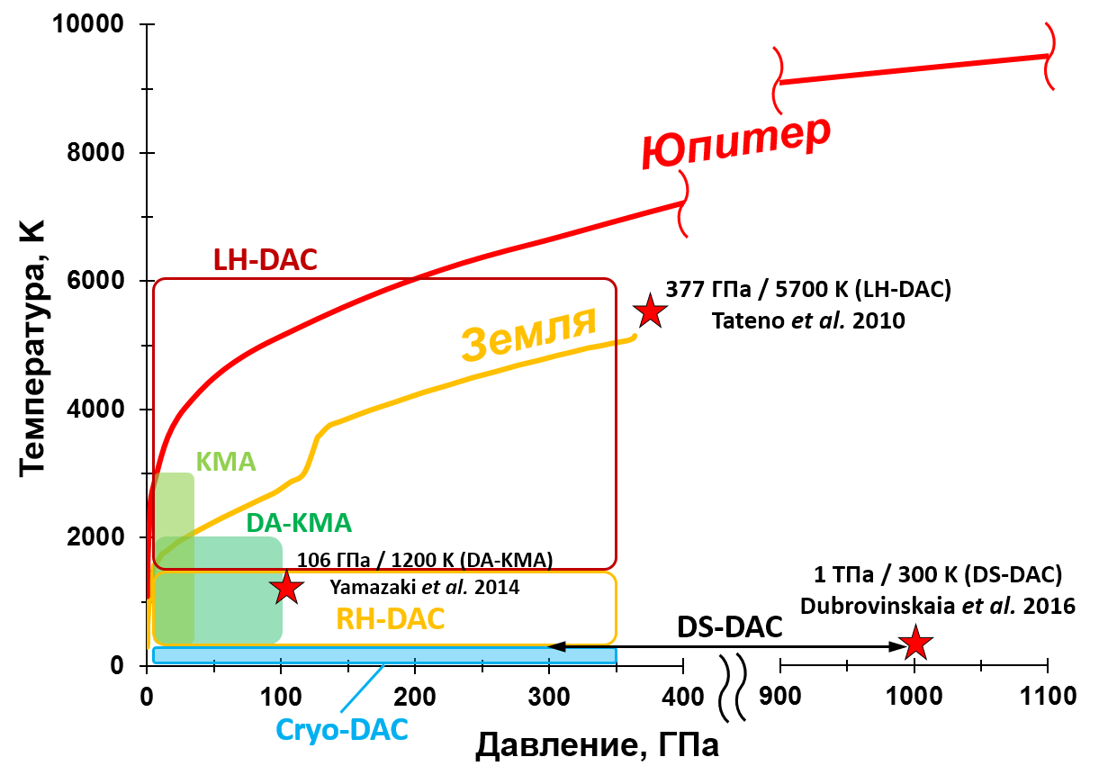 Диапазоны статических давлений и температур, доступных при использовании различеых методов: LH-DAC - ячейка высокого давления с алмазными наковальнями и лазерным нагревом (diamond anvil cell with laser heating); RH-DAC - ячейка с алмазными наковальнями и резистивным нагревом (diamond anvil cell with resistive heating); DS-DAC - двухступенчатая ячейка с алмазными наковальнями (double-stage diamond anvil cell). KMA - многопуансонный аппарат типа Каваи (Kawai multi-anvil apparatus); DA-KMA - многопуансонный аппарат типа Каваи с алмазными пуансонами (diamond anvil Kawai multi-anvil apparatus).